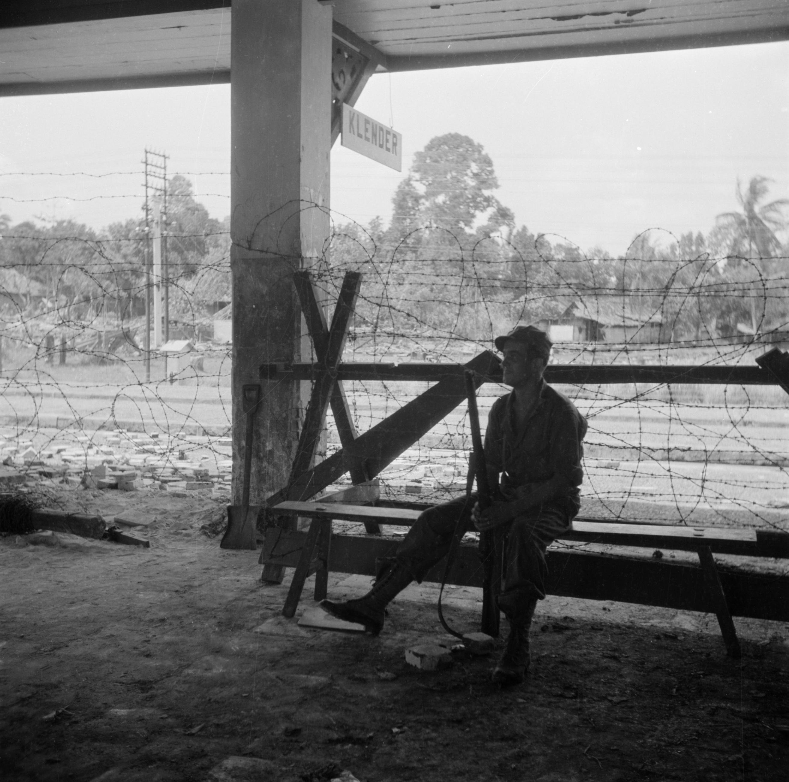 Collectie / Archief : Fotocollectie Van de Poll Reportage / Serie : Oorlogsvrijwilligers in Malakka en Indonesië Beschrijving : Militair op wacht bij het station van Klender Annotatie : Gepubliceerd in ‘Kerels van de daad’ met het bijschrift: “de stations worden scherp bewaakt" Datum : 28 maart 1946 Locatie : Indonesië, Klender, Nederlands-Indië Trefwoorden : militairen, stations Fotograaf : Poll, Willem van de, [onbekend] Auteursrechthebbende : Nationaal Archief Materiaalsoort : Negatief (zwart/wit) Nummer archiefinventaris : bekijk toegang 2.24.14.02 Bestanddeelnummer : 255-6842